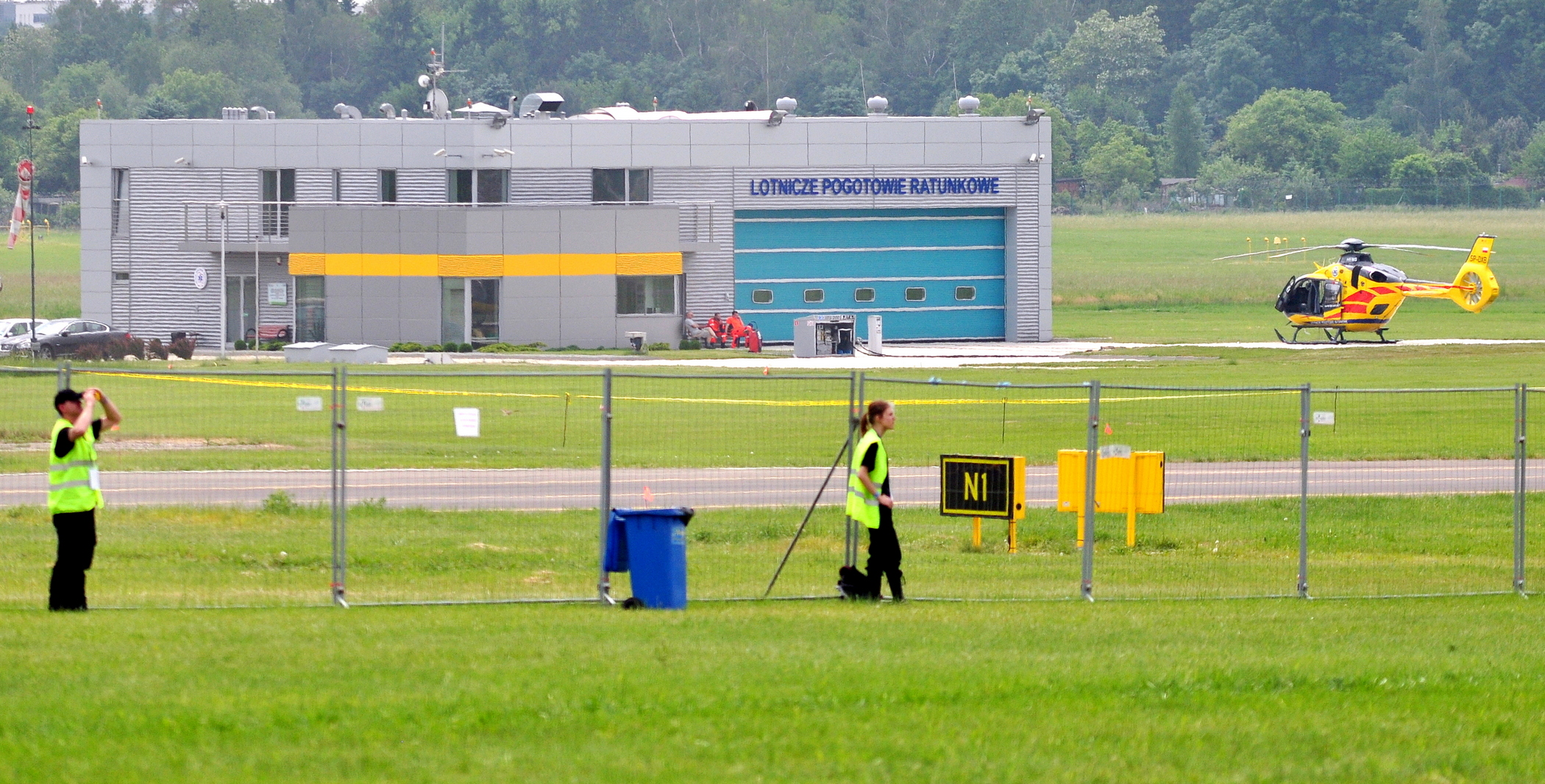 Baza Lotniczego Pogotowia Ratunkowego Port lotniczy Poznań-Ławica (ratownik 9). Na płycie postojowej śmigłowiec EC 135 n.b. SP-DXB